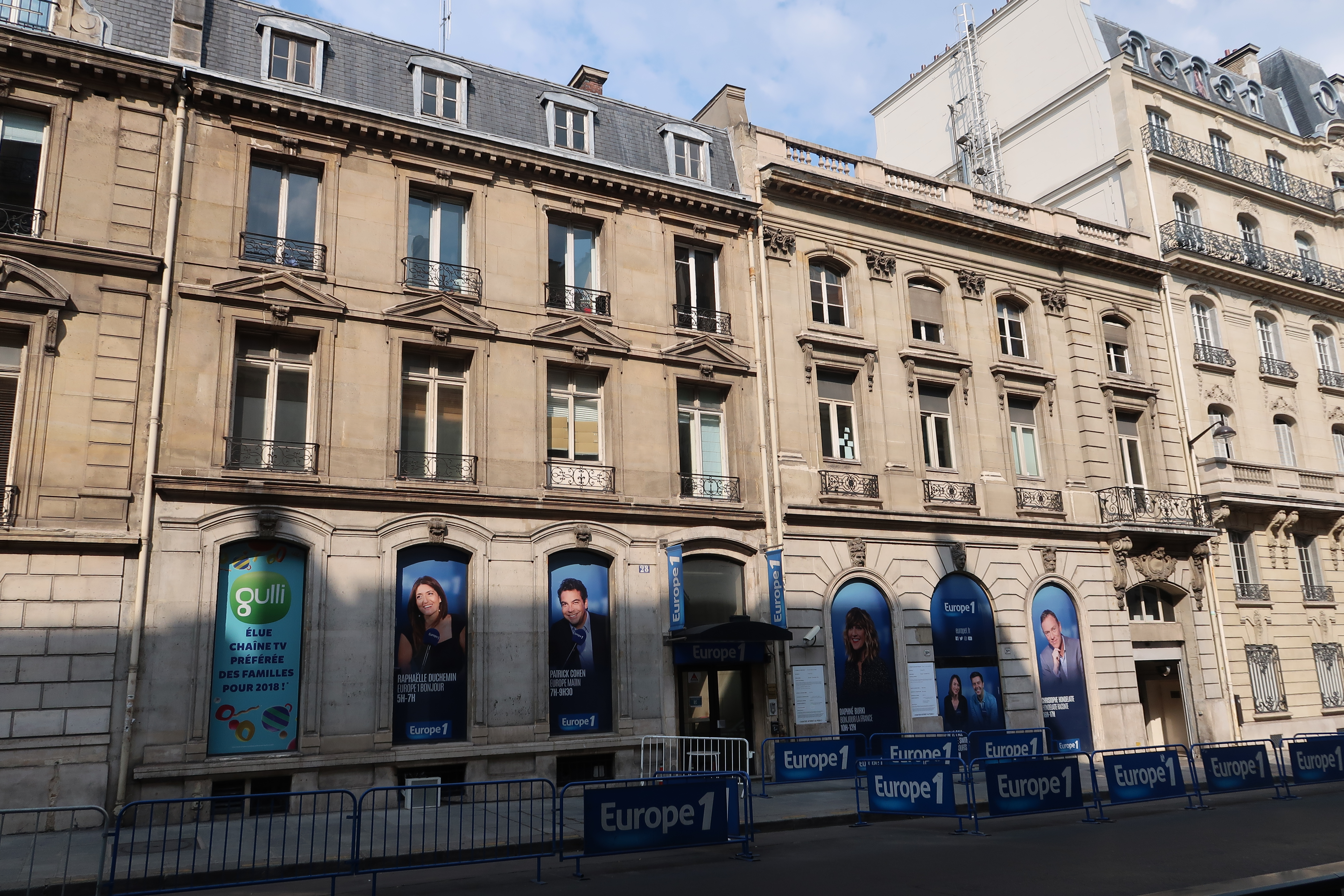 Siège d'Europe 1, 26 bis rue François Ier (Paris, 8e).